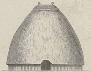 Collection of the Natural Sciences Commission for the Dutch East Indies